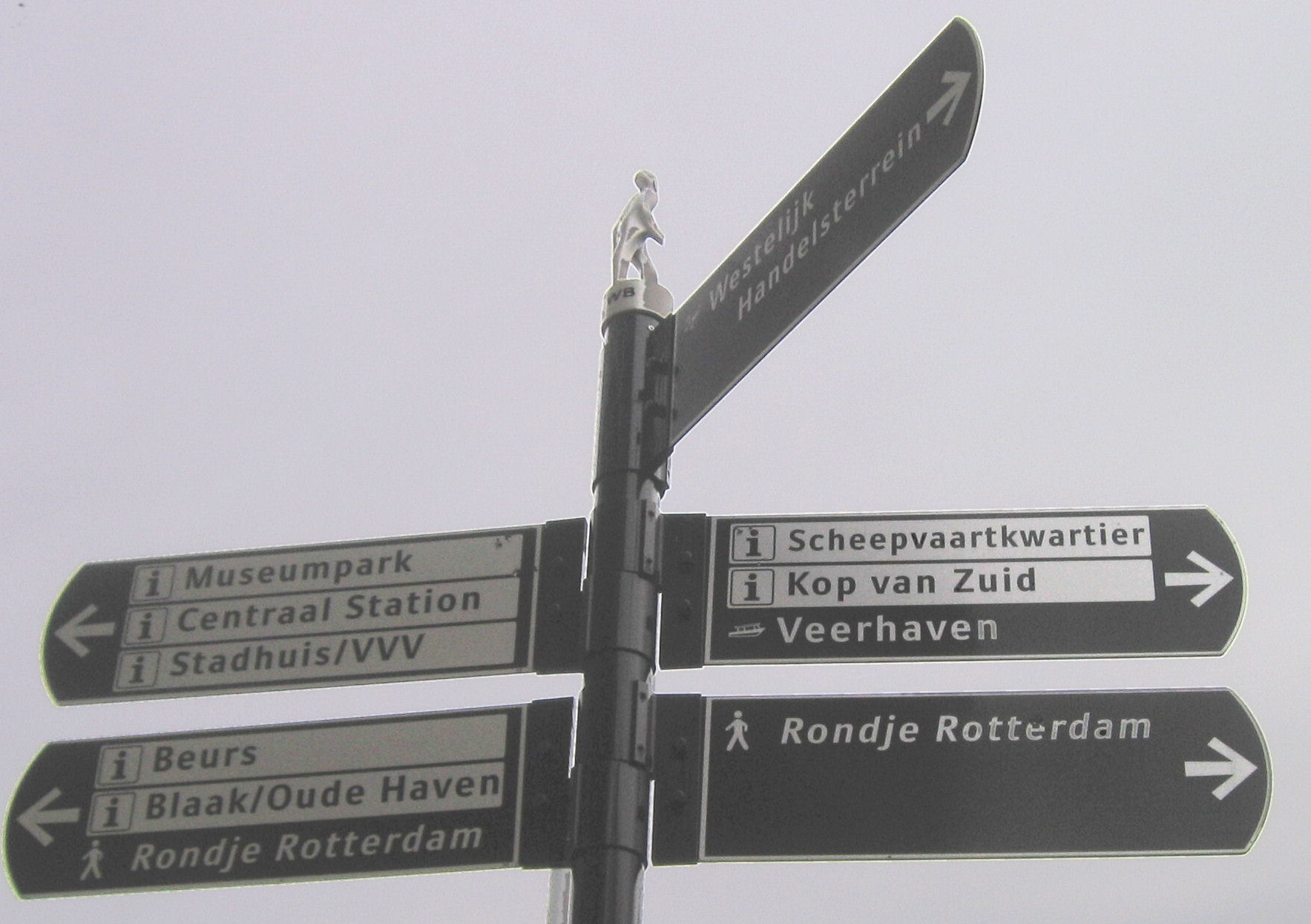 ANWB-bord met bewegwijzering van Rondje Rotterdam.